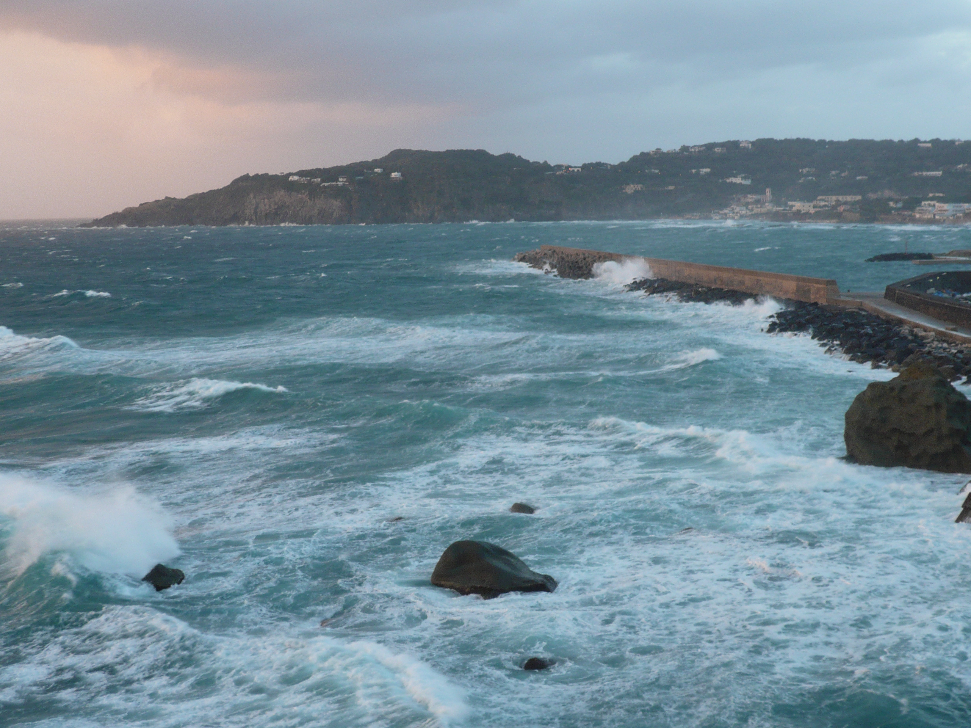 mareggiata sulle coste di Forio vista dalla terrazza alle spalle della Chiesa del Soccorso. Autore foto: Roberto De Martino